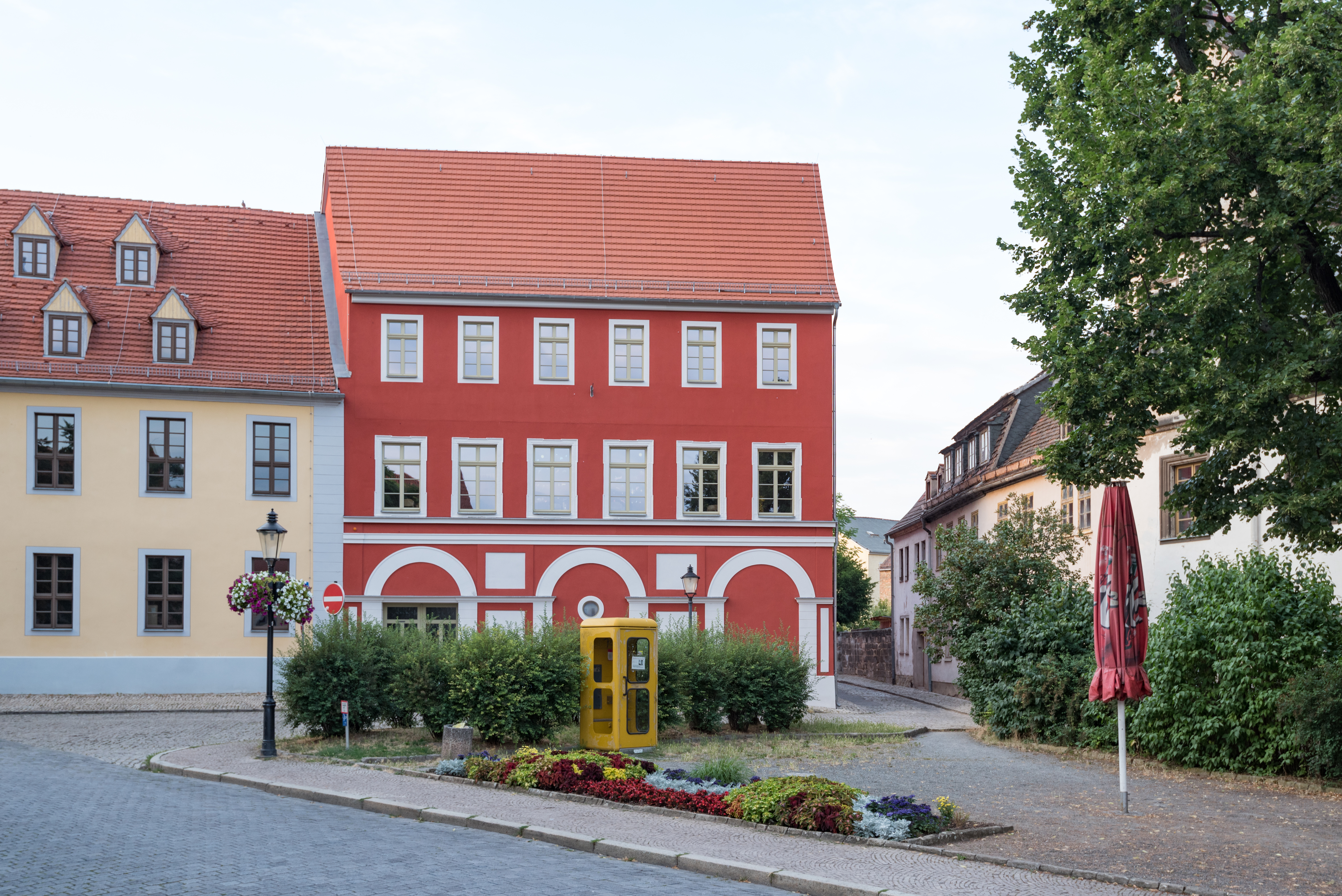 Naumburg (Saale), Domplatz 2